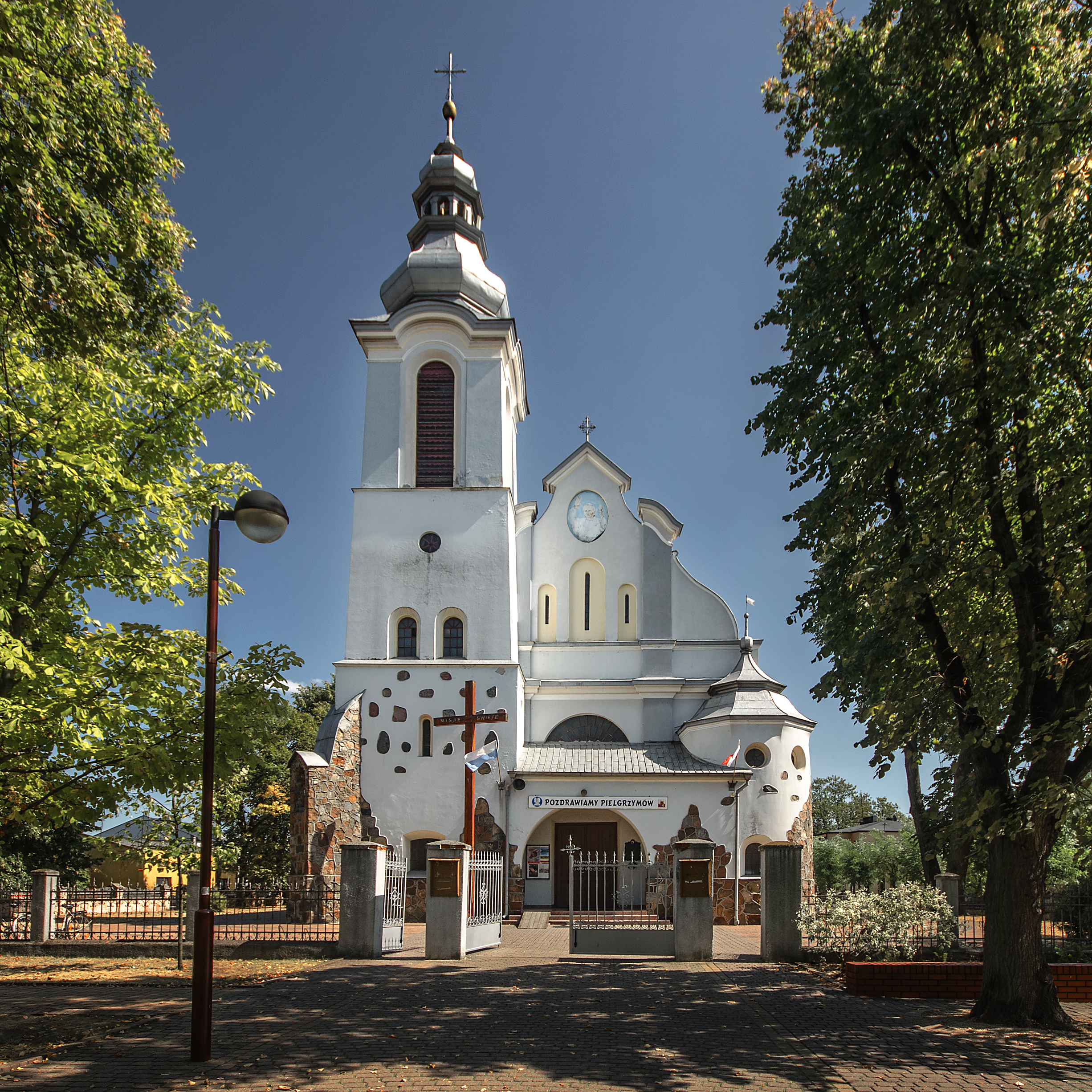 Kościół Narodzenia NMP, Szczerców, gm. Szczerców, pow. bełchatowski, woj. łódzkie